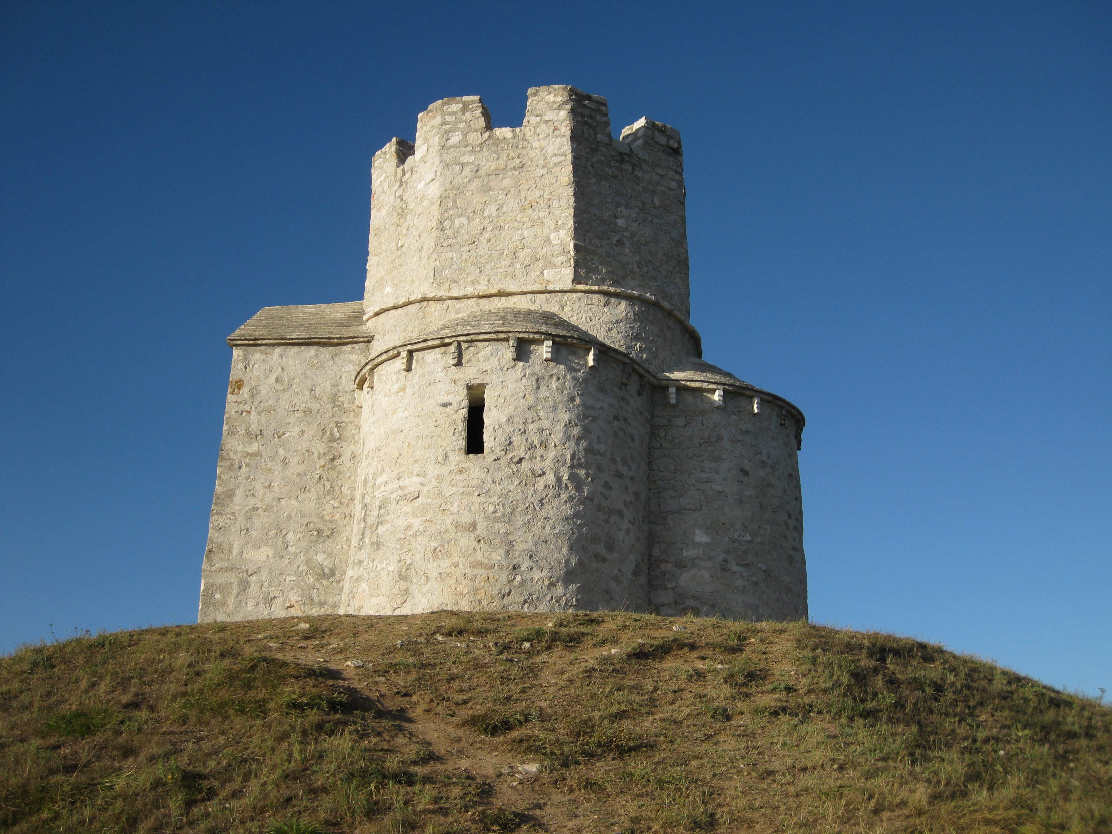 Crkva sv. Nikole kod Nina